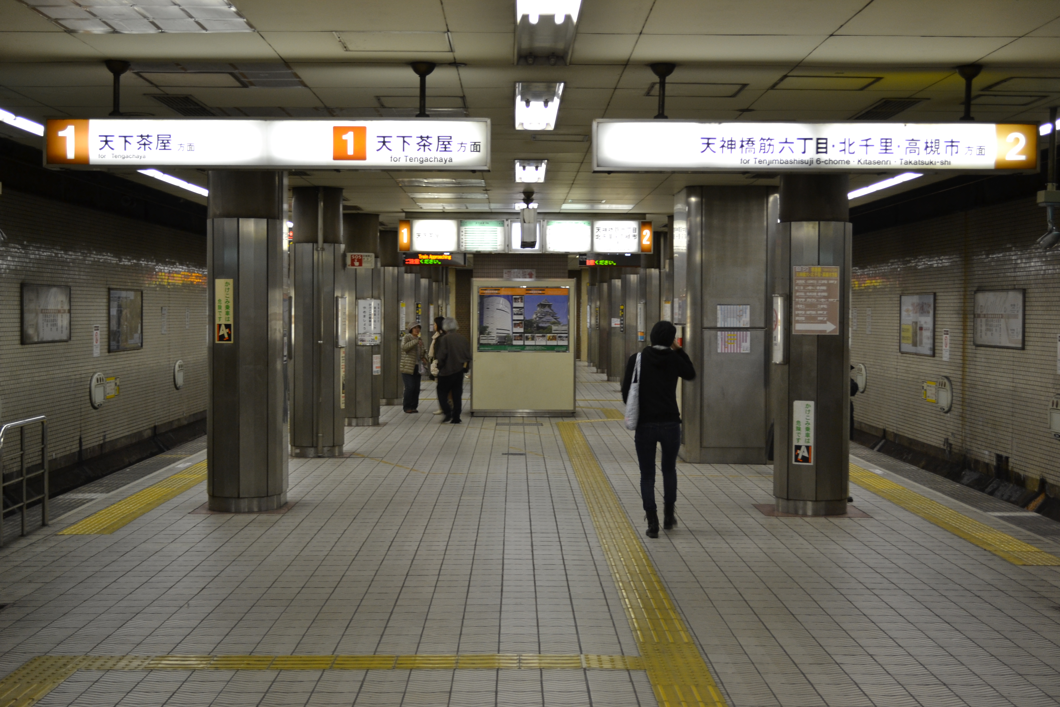 動物園前駅堺筋線プラットホーム